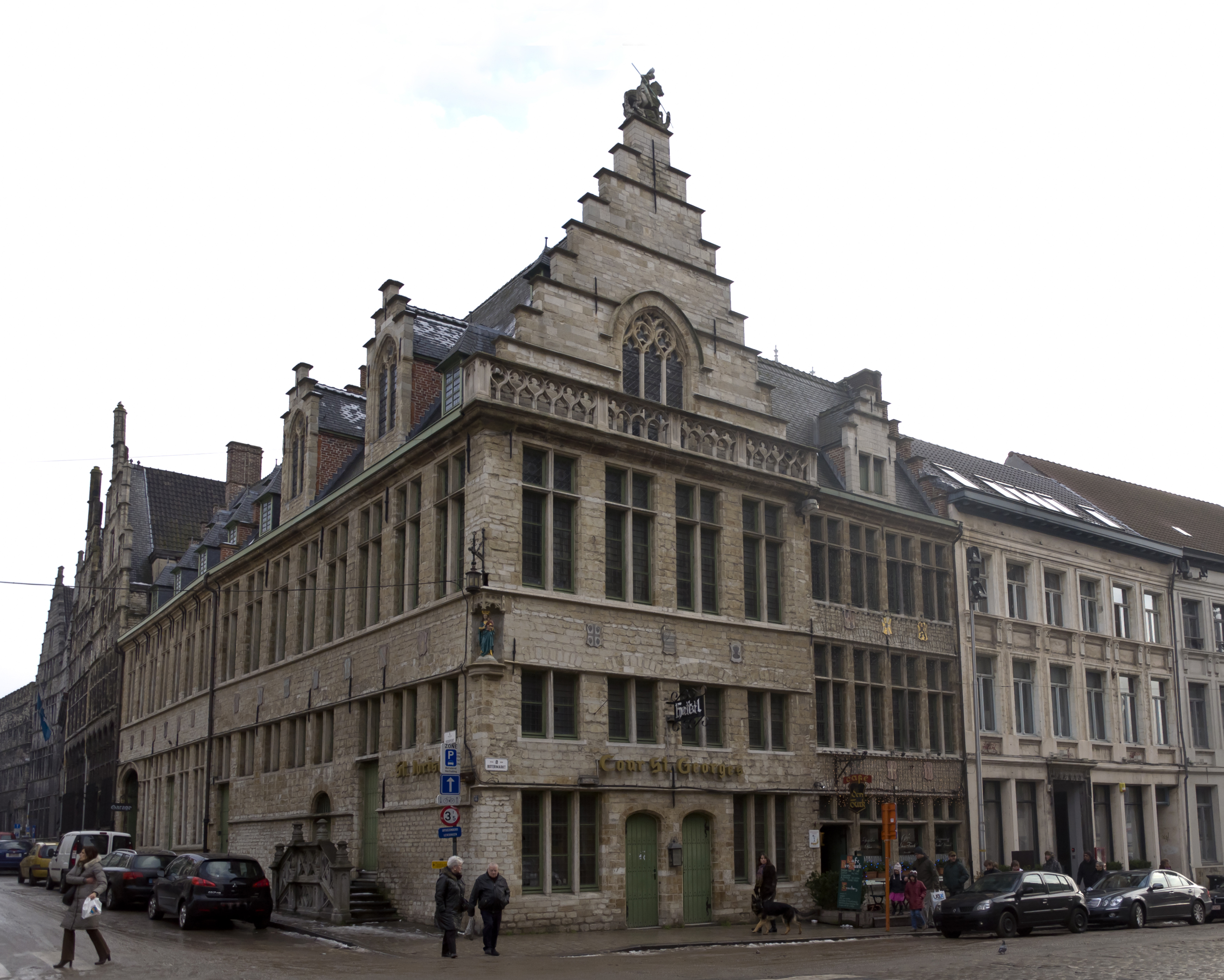 Sint-Jorishof te Gent